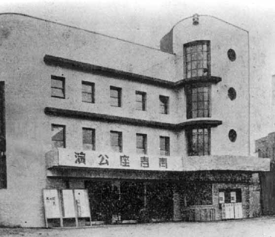 1940年前後の京城府、東洋劇場